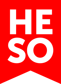 Logo HESO